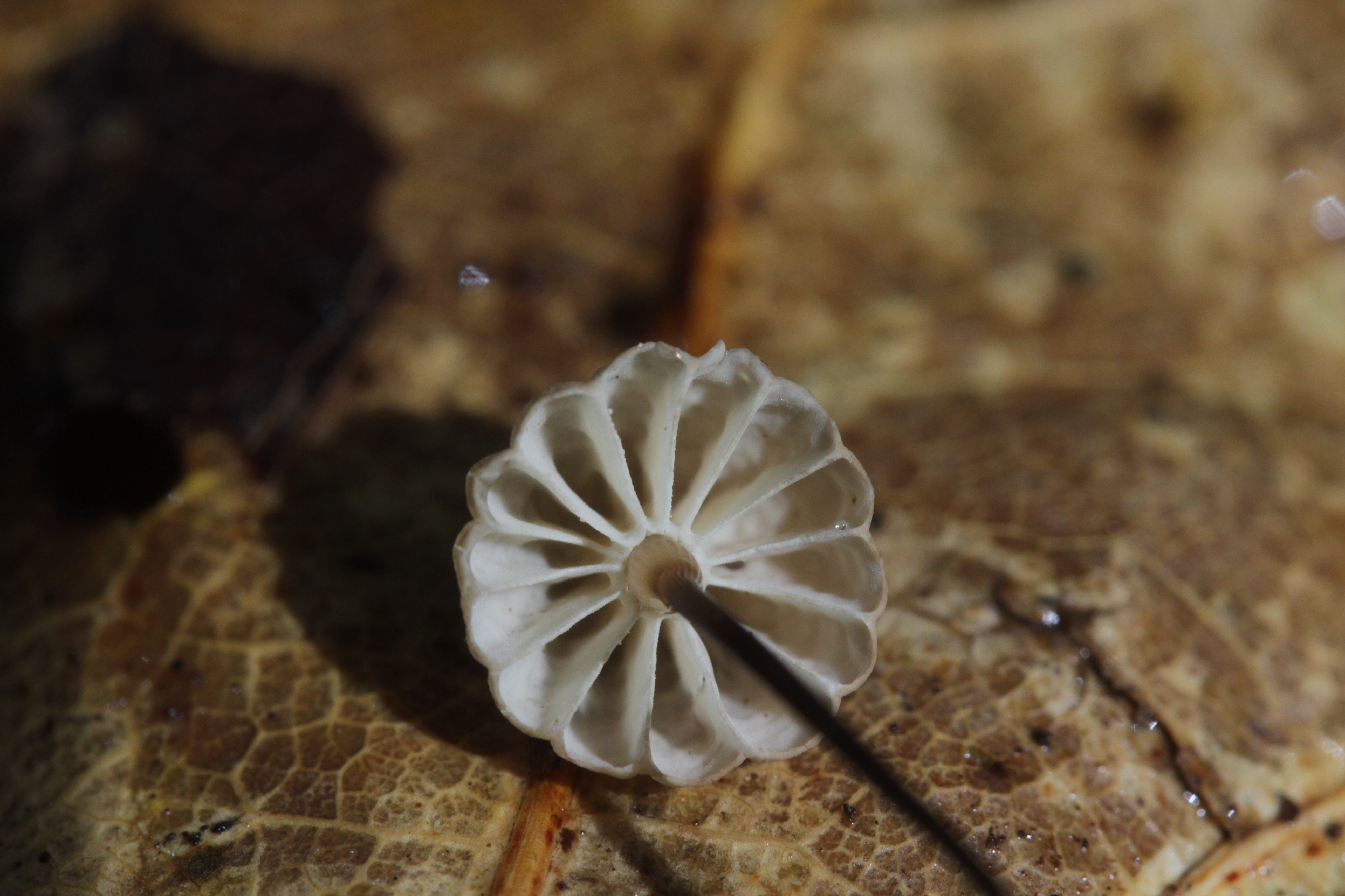 Marasmius bulliardii